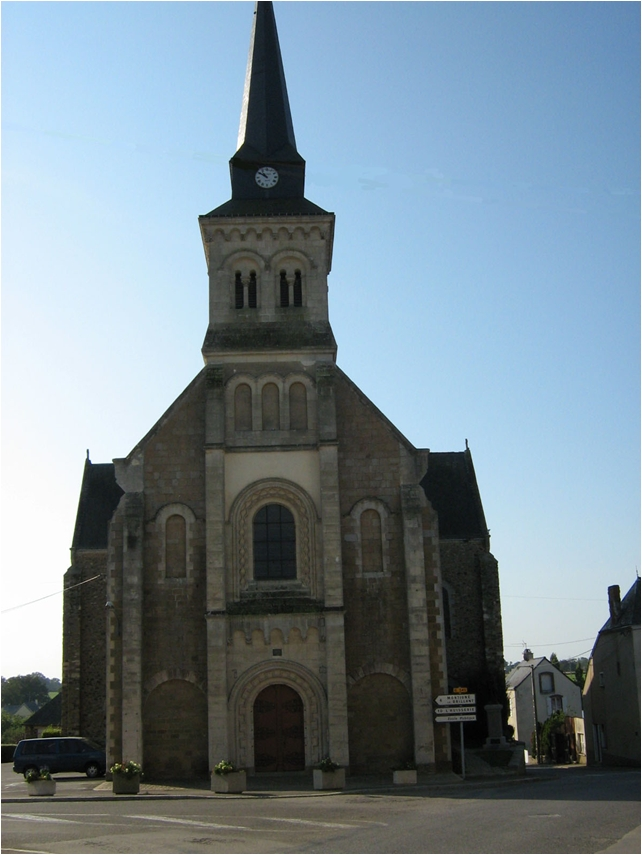 Église Notre-Dame de l'Assomption d'Ahuillé (Mayenne). Architecte : Renous. Inauguration : 25/04/1866.